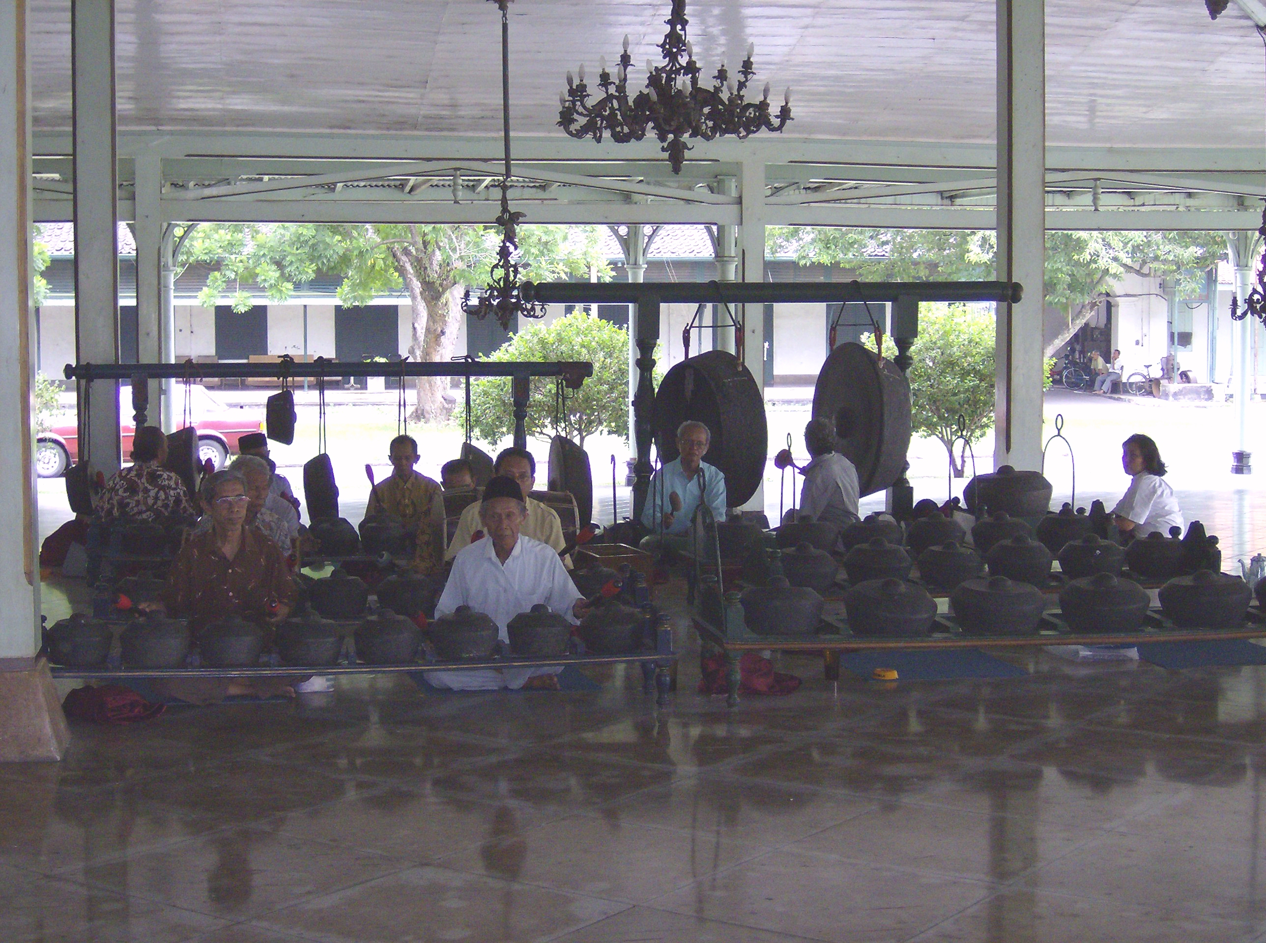 Gamelan practice at Mangkunagaran palace in Surakarta